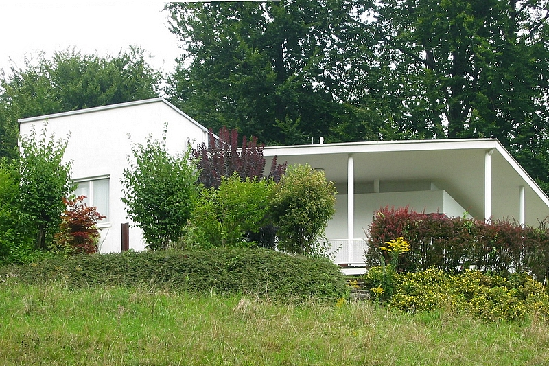 Landhaus Gamerith oder Villa Plischke, erbaut 1933/34 nach Plänen von Ernst Anton Plischke